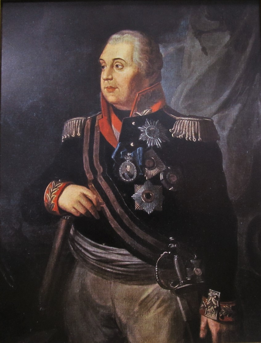 Обратите внимание! Что именно этот портрет - это работа не Дж.Доу, а Р.М. Волкова! У Доу - совершенно другое изображение Кутузова!